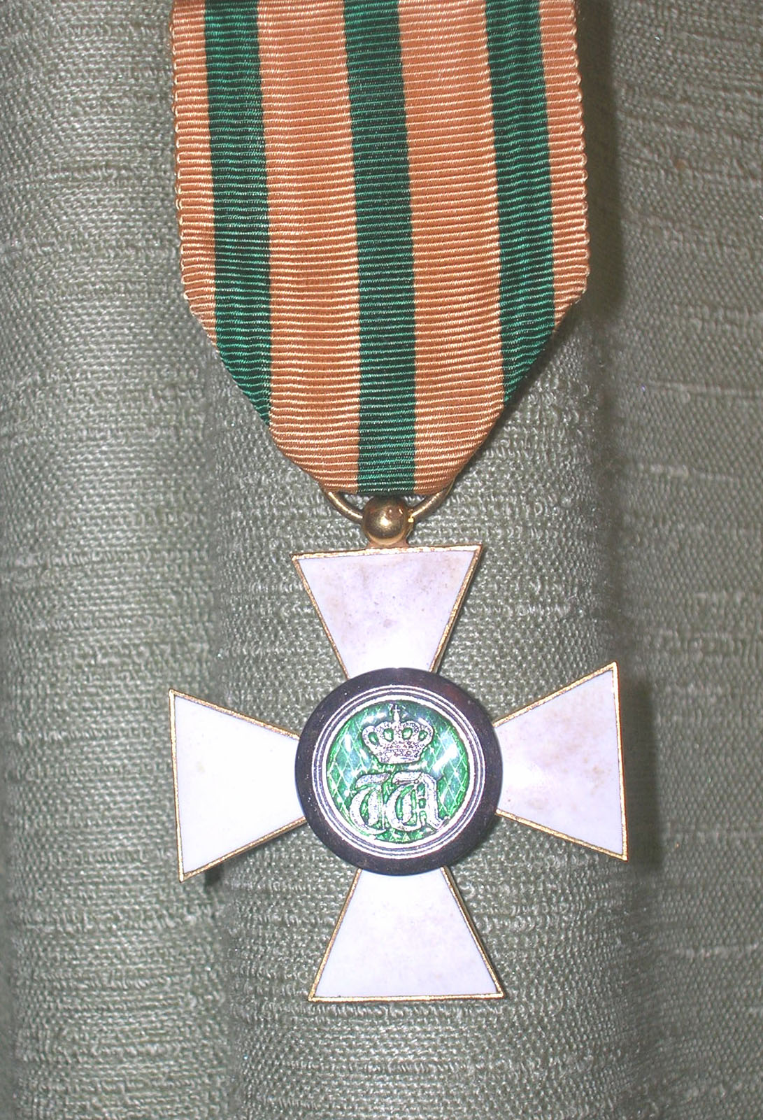 Sujet: Chevalier vum Ordre de la Couronne de ChÃªne Source:Eege Foto vum user ernmuhl Lizenz:GDFL